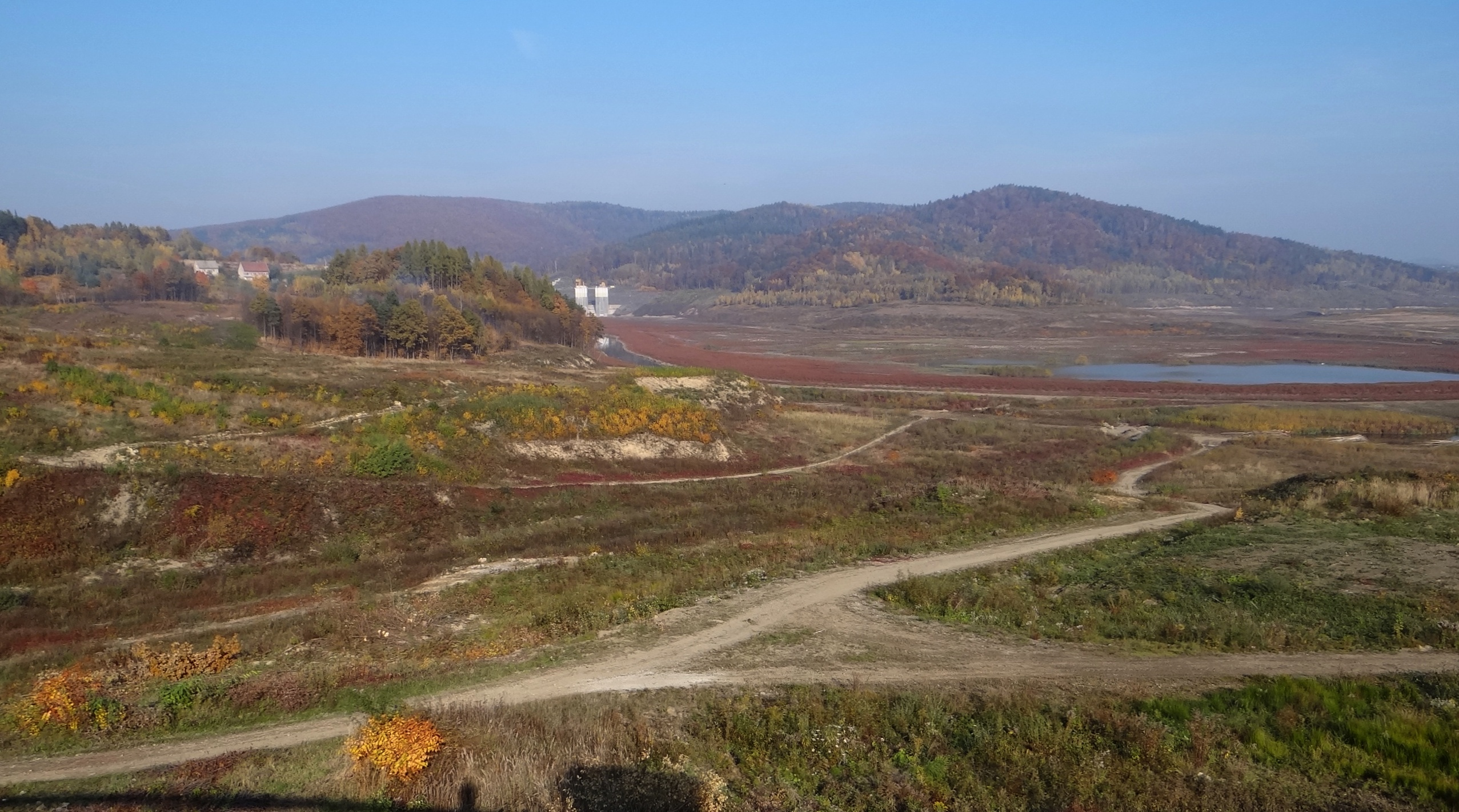 Jaroszowicka Góra, Wierzchowina i dolina Skawy